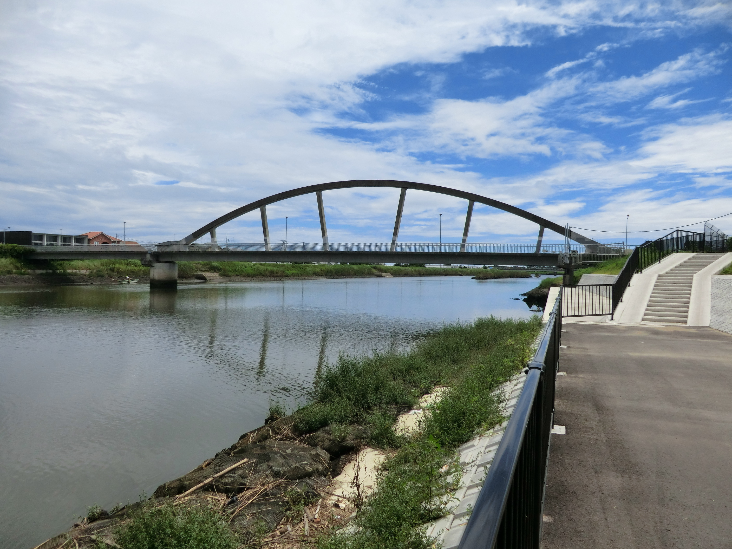 一の宮川にかかる外房線沿いの橋